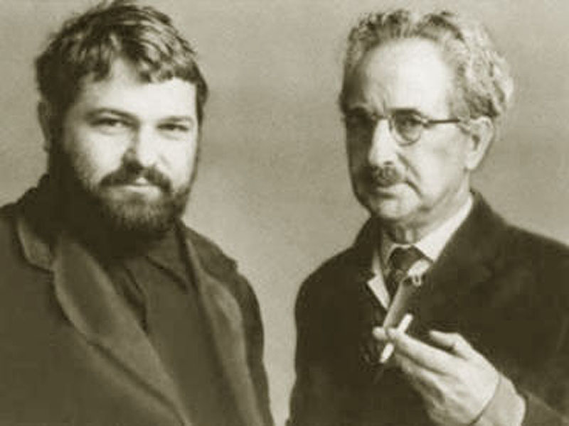 Юлиан Семенов и его отец